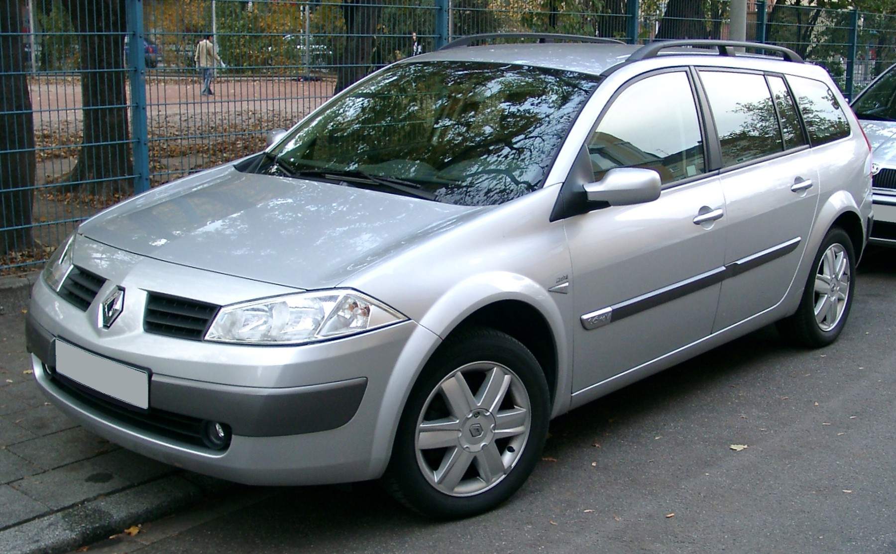 Renault Mégane Kombi